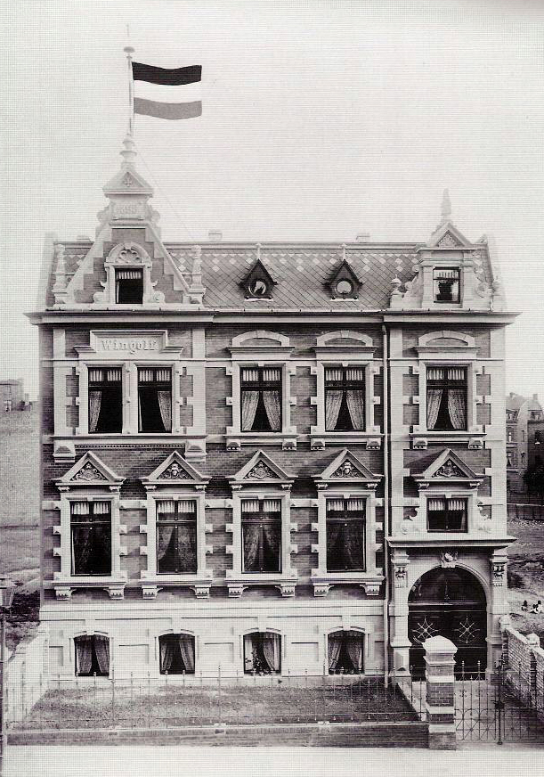 Ansicht des Wingolfshauses zu Halle (Saale) vor 1900